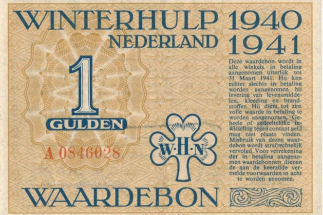 Waardebon van Stichting Winterhulp Nederland